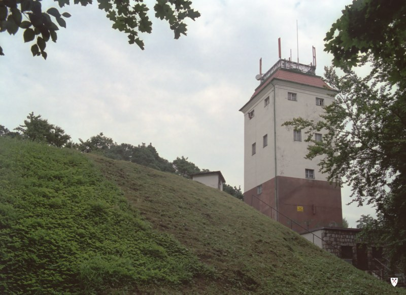 Lębork - wieża ciśnień. Autor zdjęcia: Topory Licencja: GNU FDL.